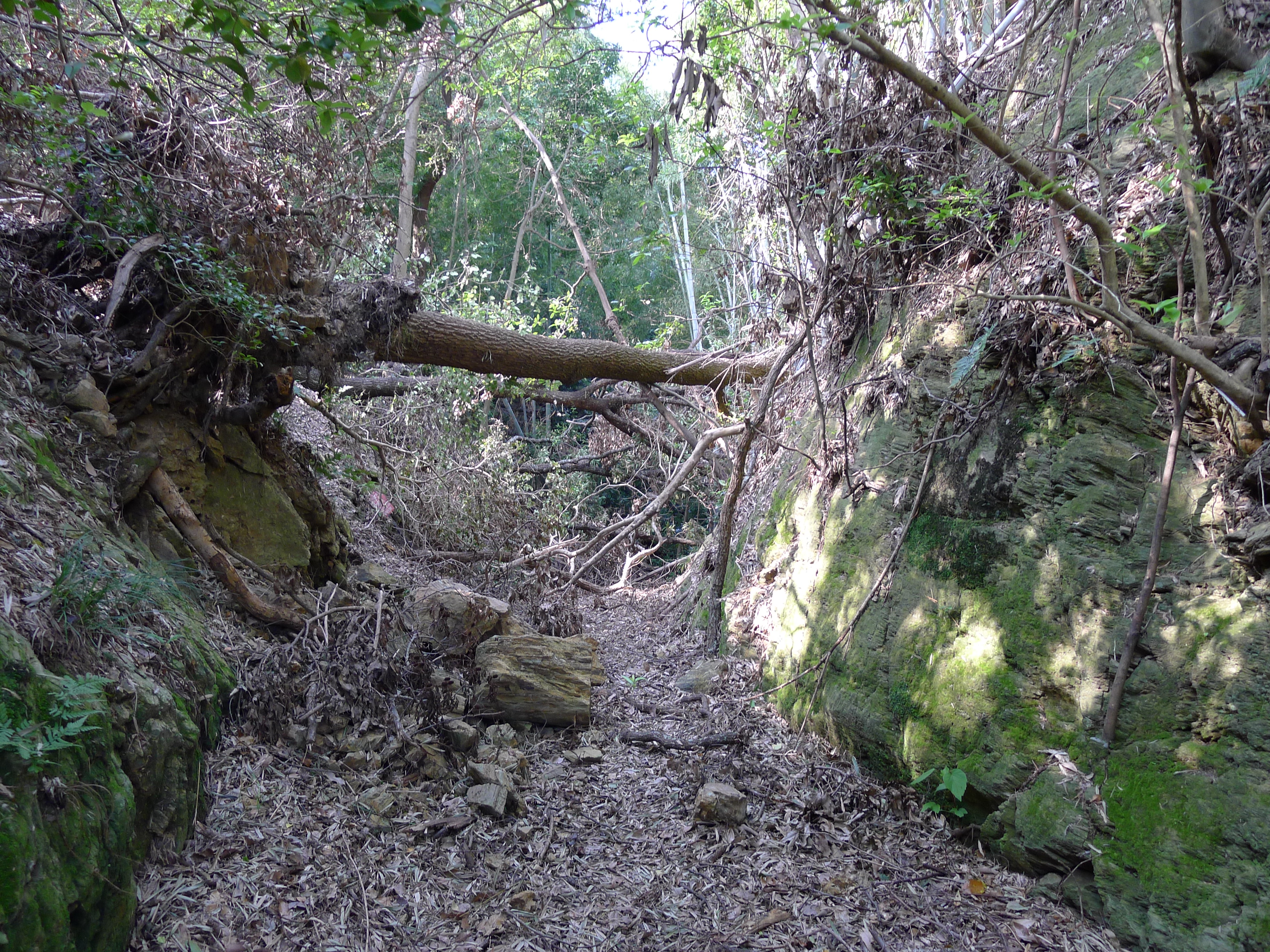 熊野古道紀伊路の矢田峠。切通しの隘路で、落石や倒木もあり通り抜けが難しい。